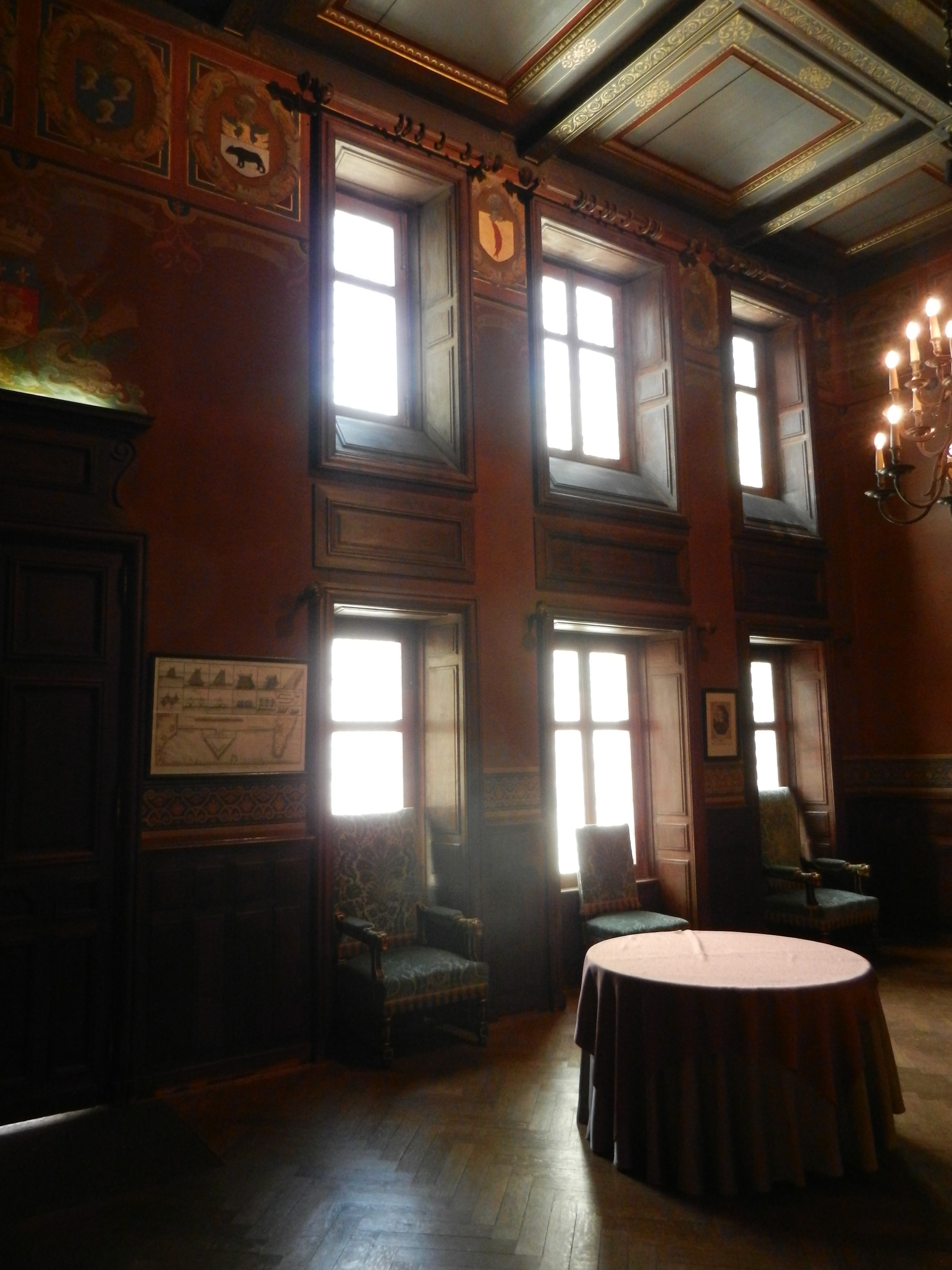 Intérieur de la salle dite des échevins.